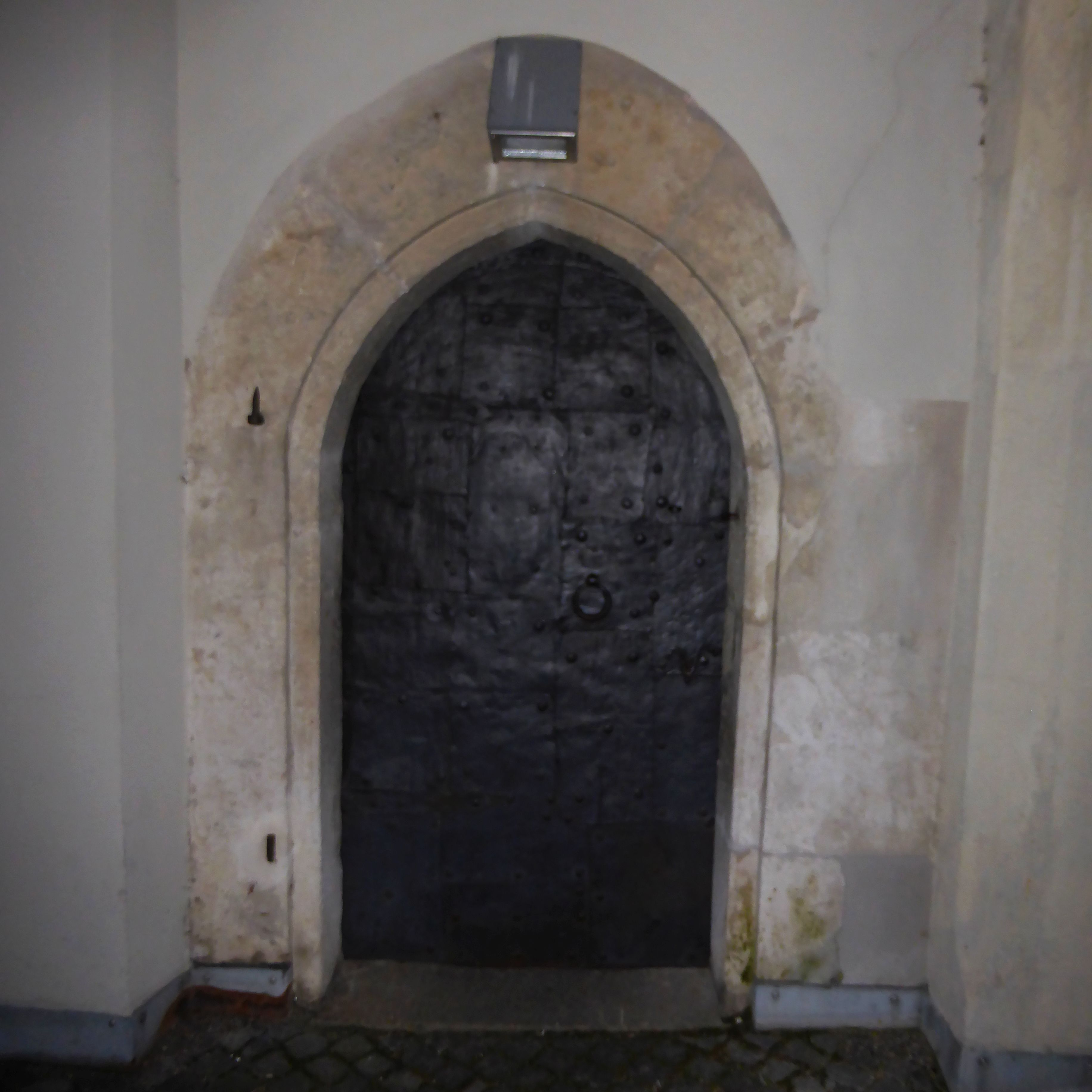 Sigmundkapelle im Thon-Dittmer-Palais